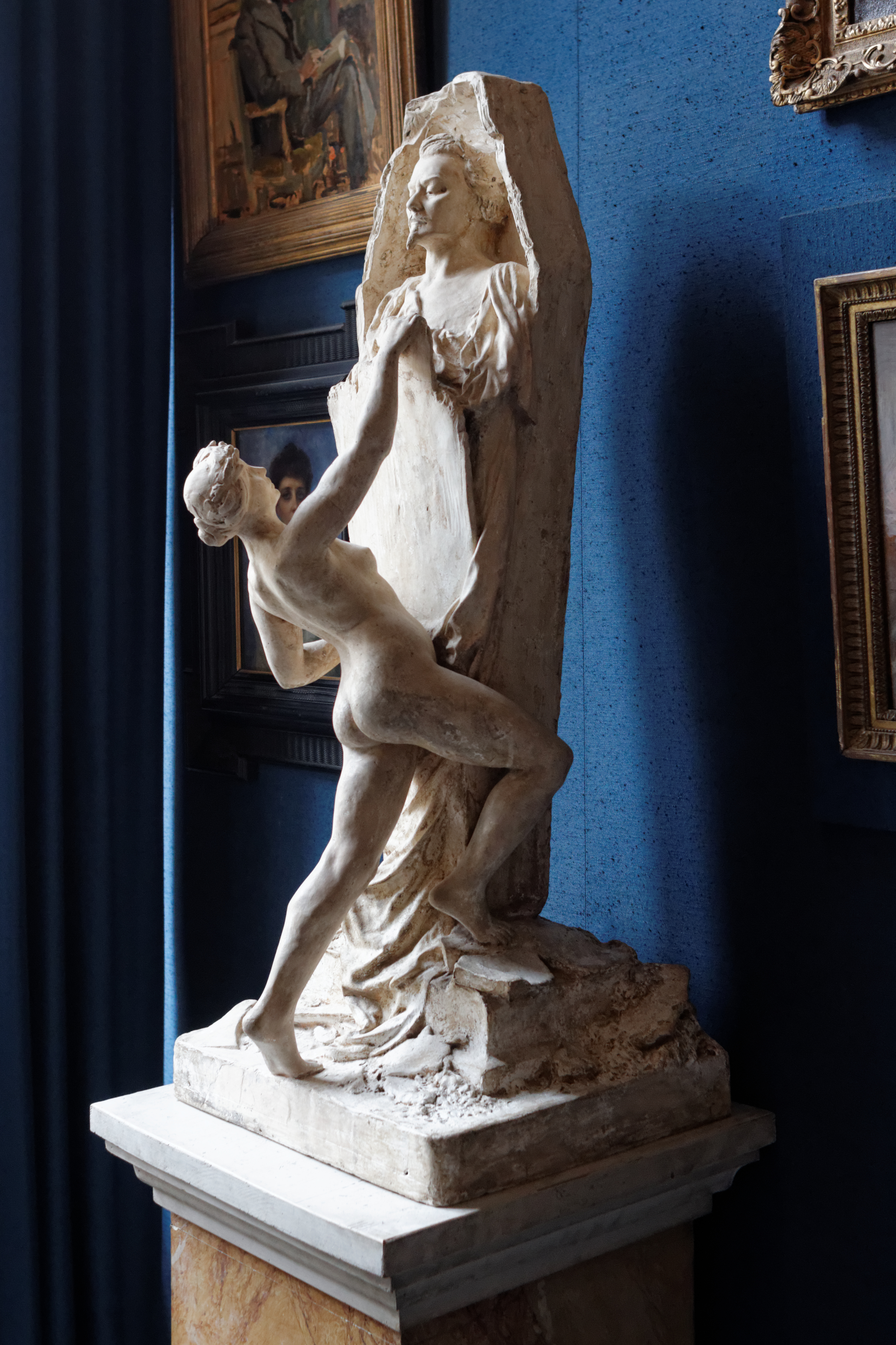 Modèle pour un monument à la mémoire d'Auguste Villiers de l'Isle-Adam représentant la gloire tirant Auguste de Villiers de l'Isle Adam de son sommeil éternel.